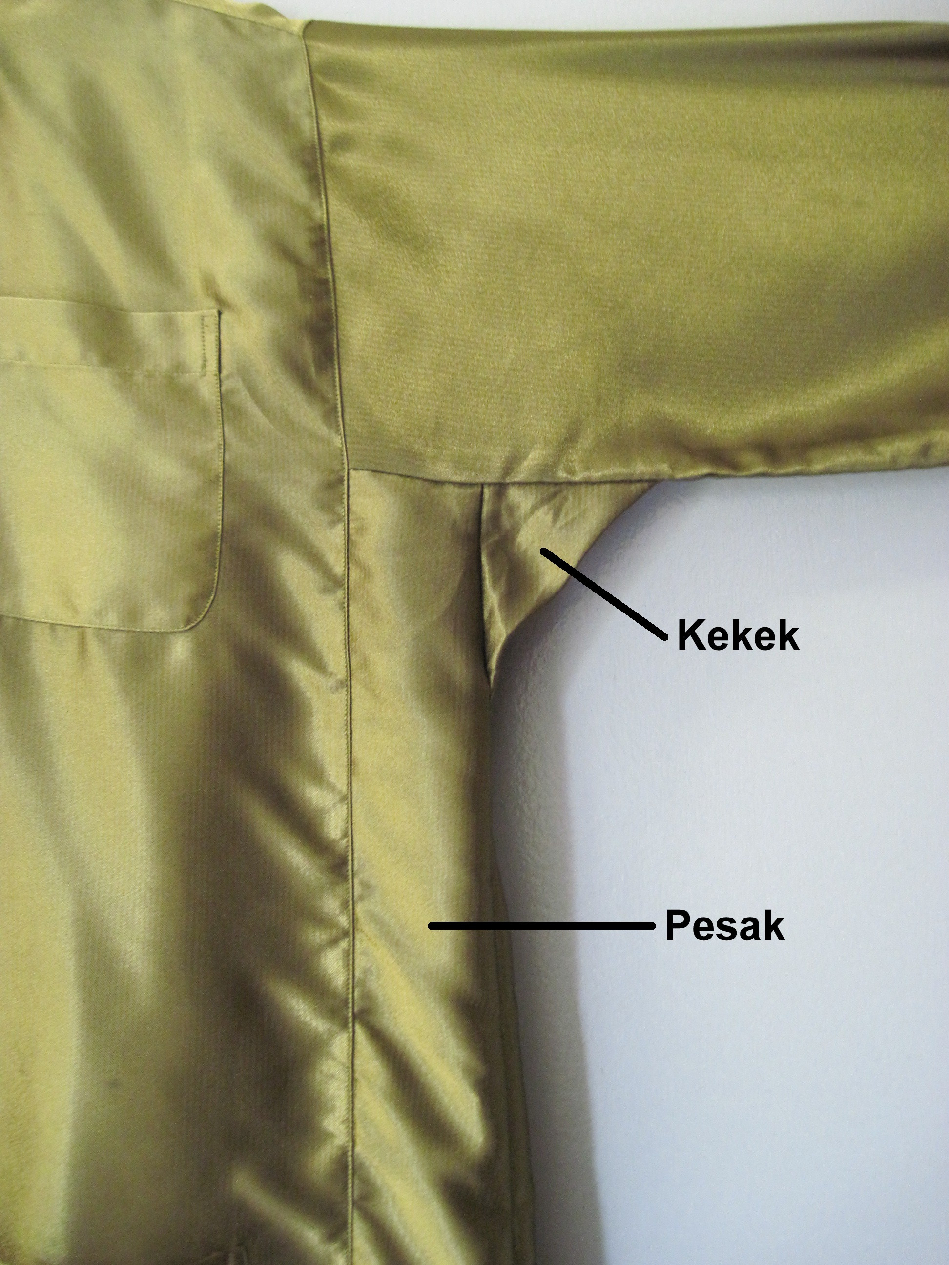 Rupa pesak dan kekek pada baju Melayu.